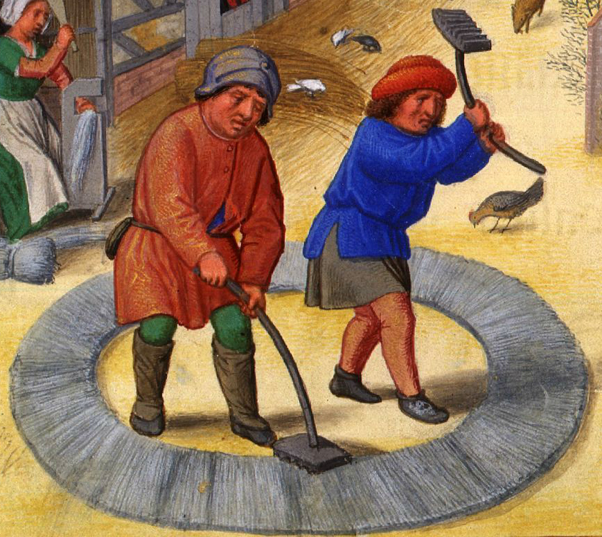 Чесание шерсти. Фрагмент миниатюры "Ноябрь. Приготовление льна для пошивки льняной одежды" из "Da Costa Hours" Симона Бенинга. Pierpont Morgan; MS M.399 (fol. 12v). Бельгия, Брюгге, ок. 1515